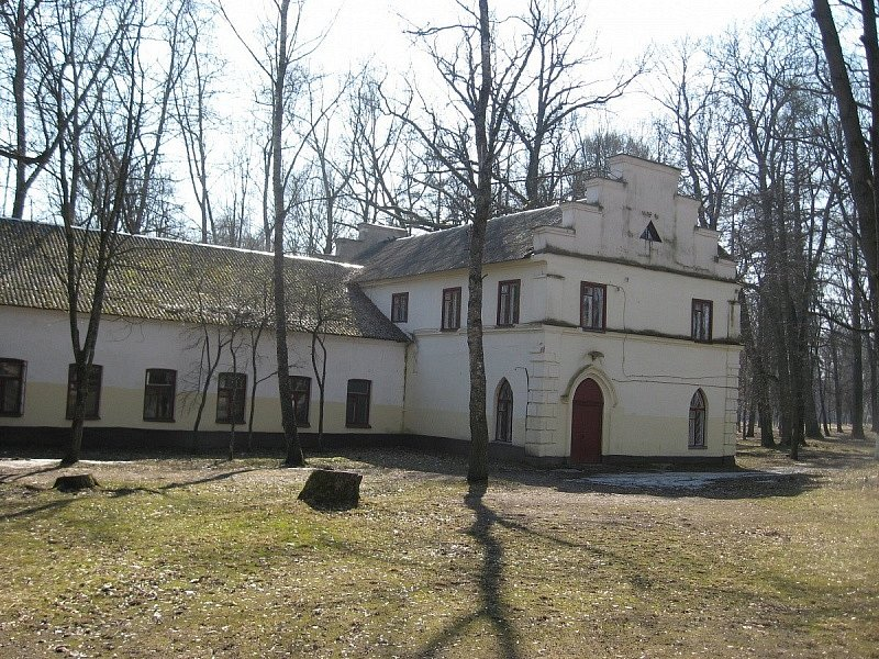 Станькава. Жылы дом